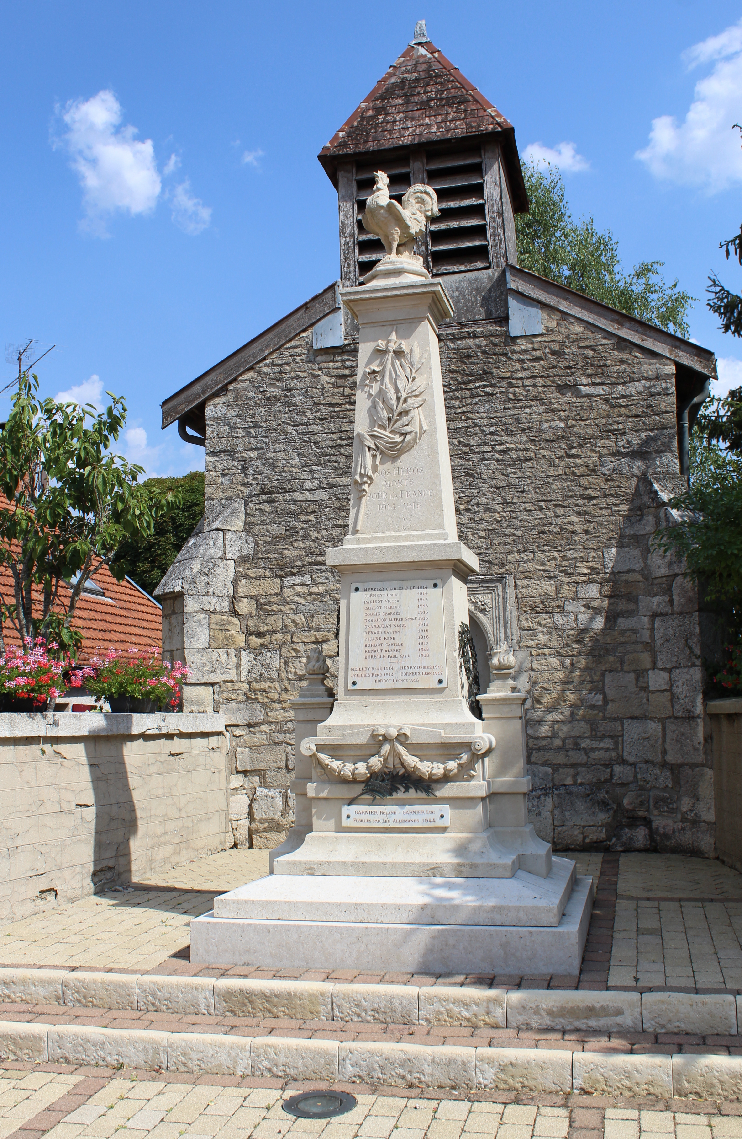 Le monument aux morts.